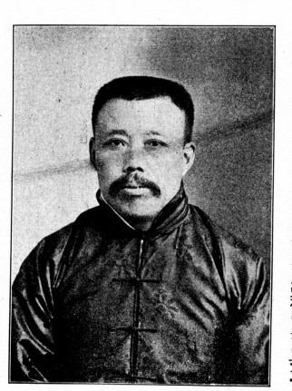 中文（台灣）: 王茂材議員